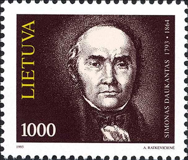 Simonas Daukantas